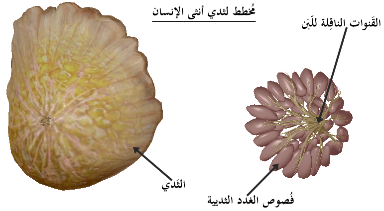 مخطط لثدي أنثى الإنسان